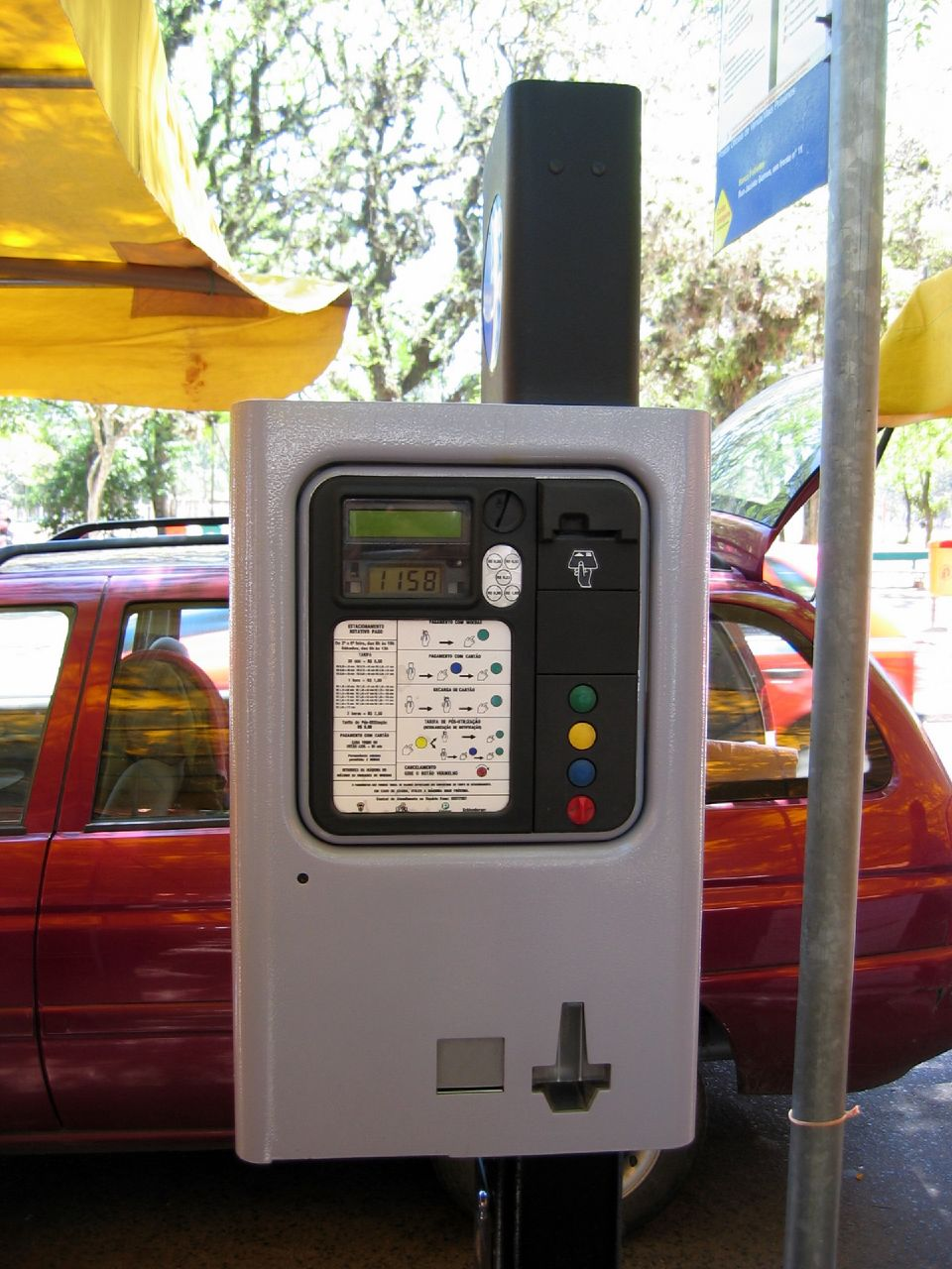 Parquímetro em Porto Alegre.